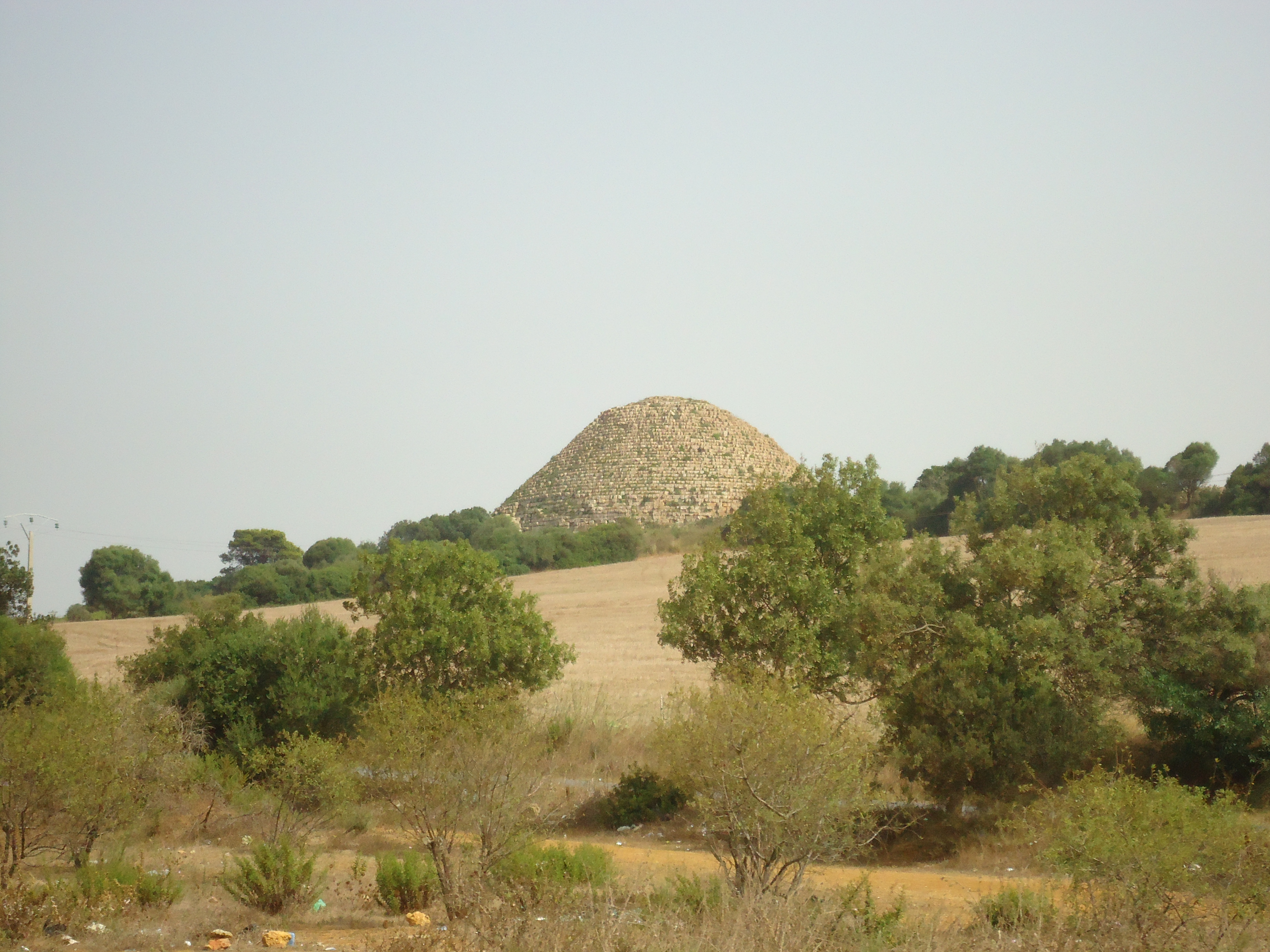 Mausolée royal de Maurétanie